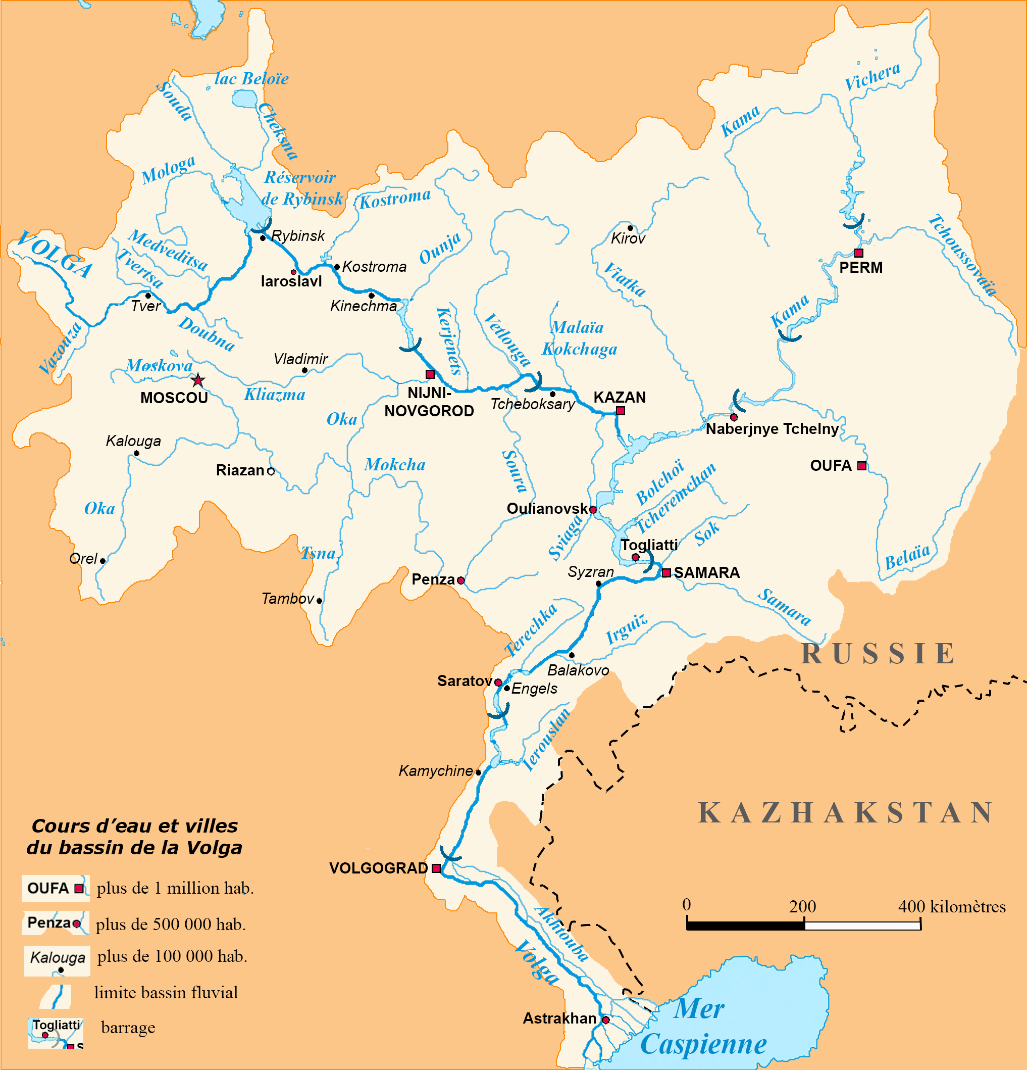 Bassin de la Volga : limites du bassin, principaux affluents, villes et barrages. Légende en français